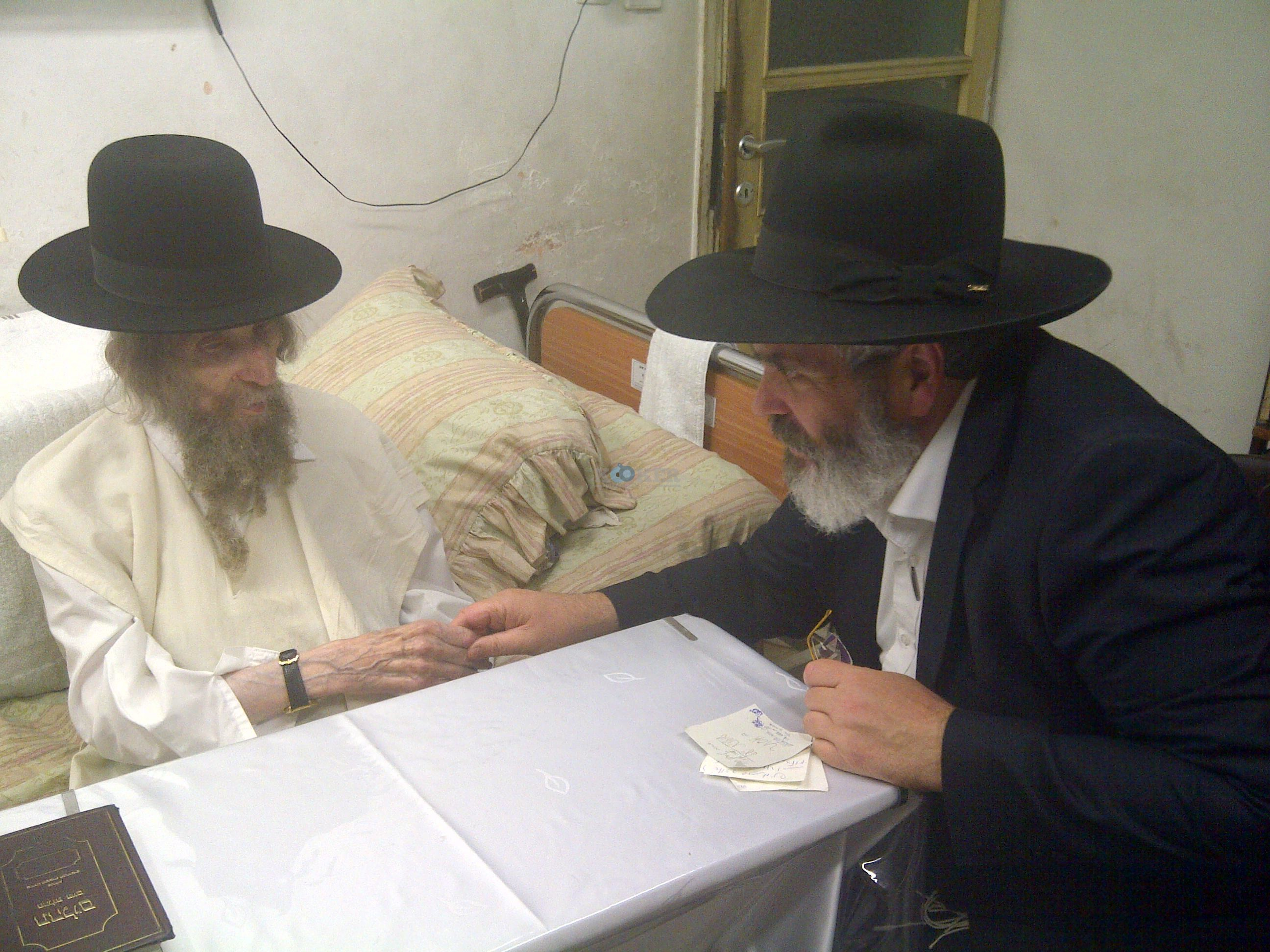 עם הרב שטיינמן